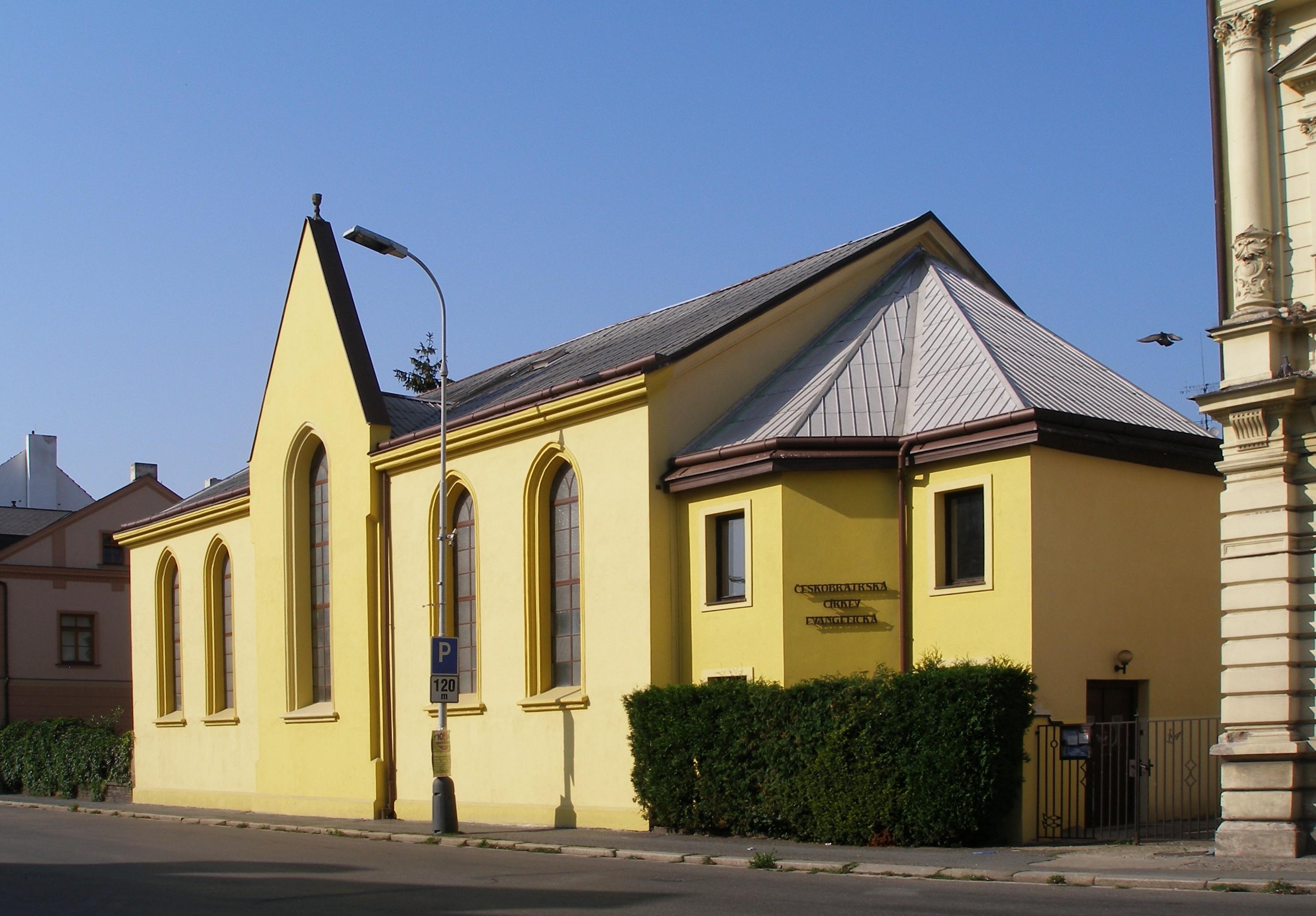 Kostel Českobratrské církve evangelické v Kolíně (Politických vězňů 560, Kolín)